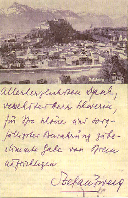 Postkarte von Stefan Zweig mit seinem Autograph vom 24. Februar 1927